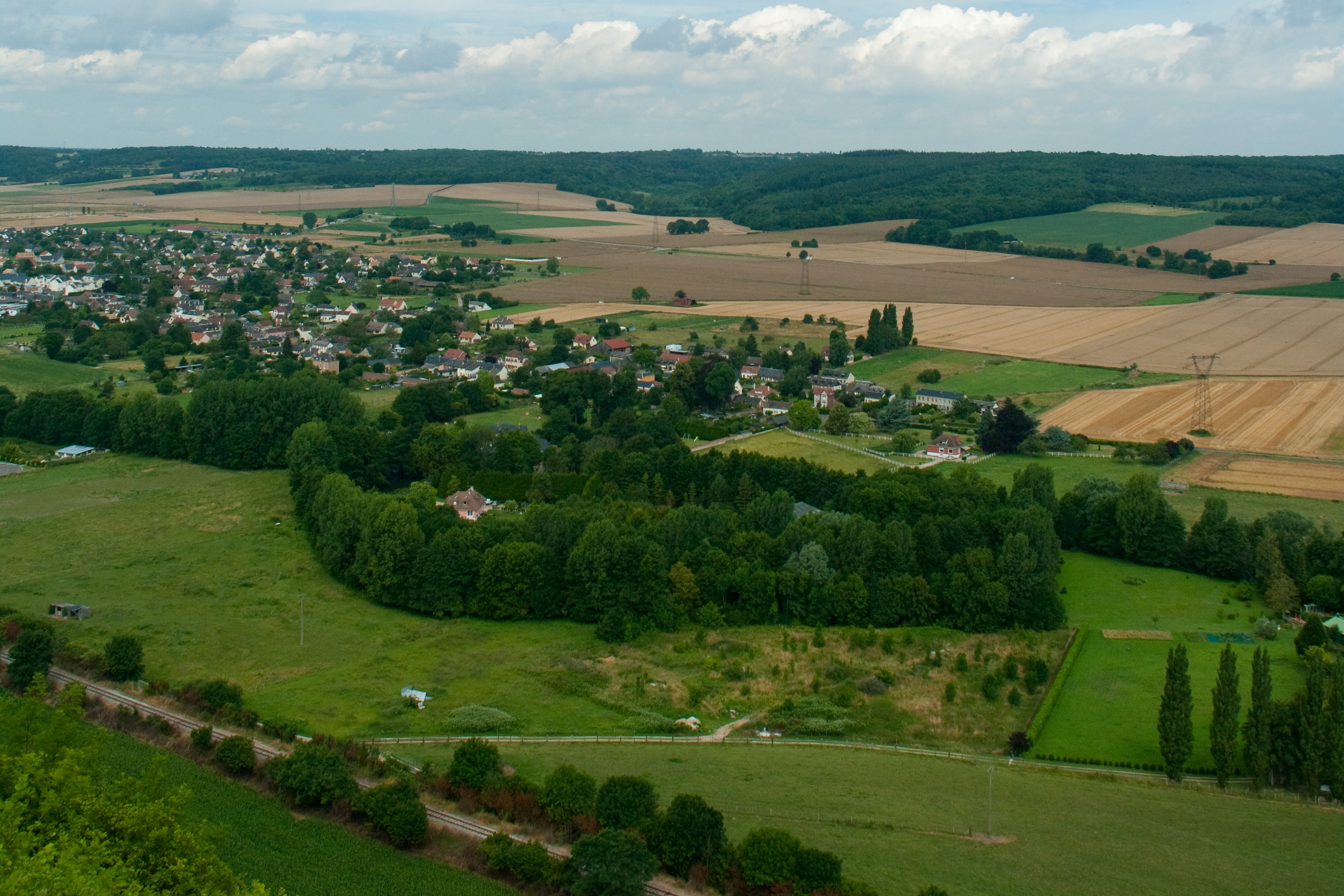 Photographie de l'Ile Sainte-Hélène depuis la colline des Deux-Amants